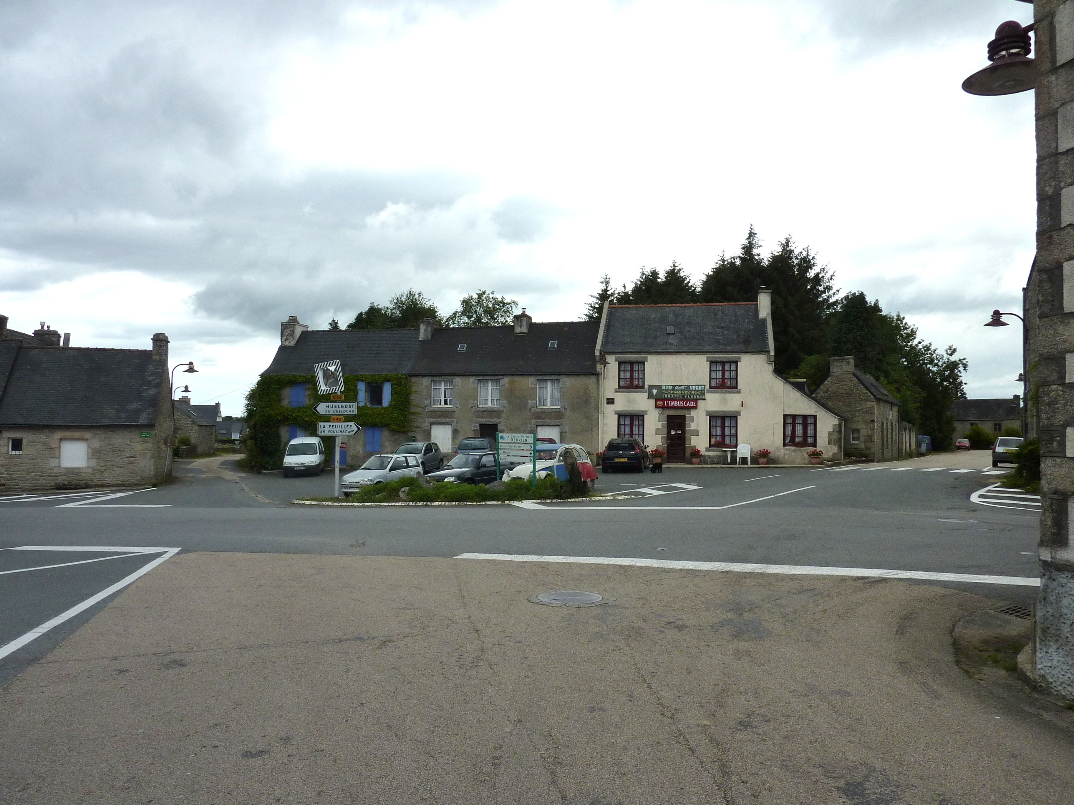 Berrien: la place du 9 juillet 1962 au carrefour principal du village